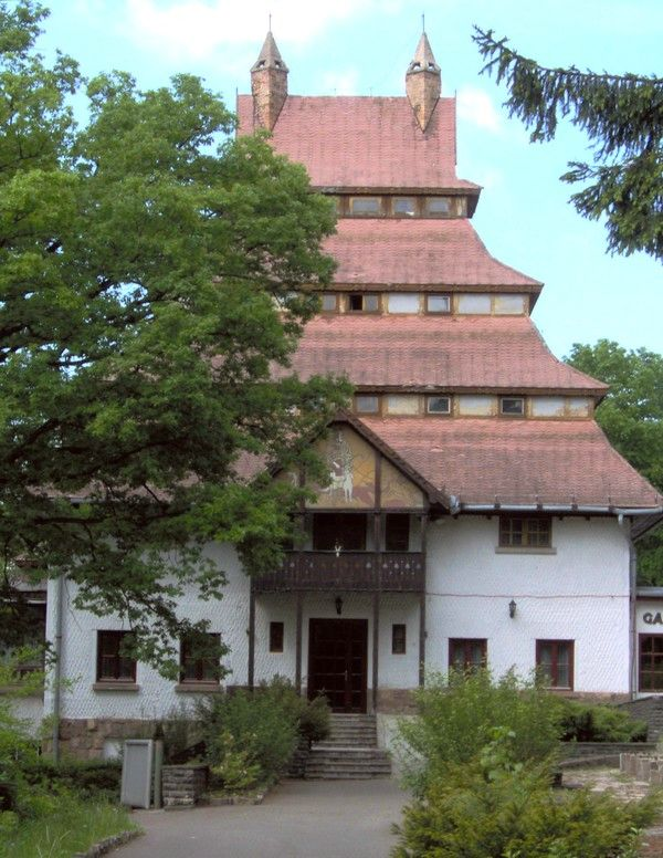 A "Pagoda" nevű épület Mátraházán